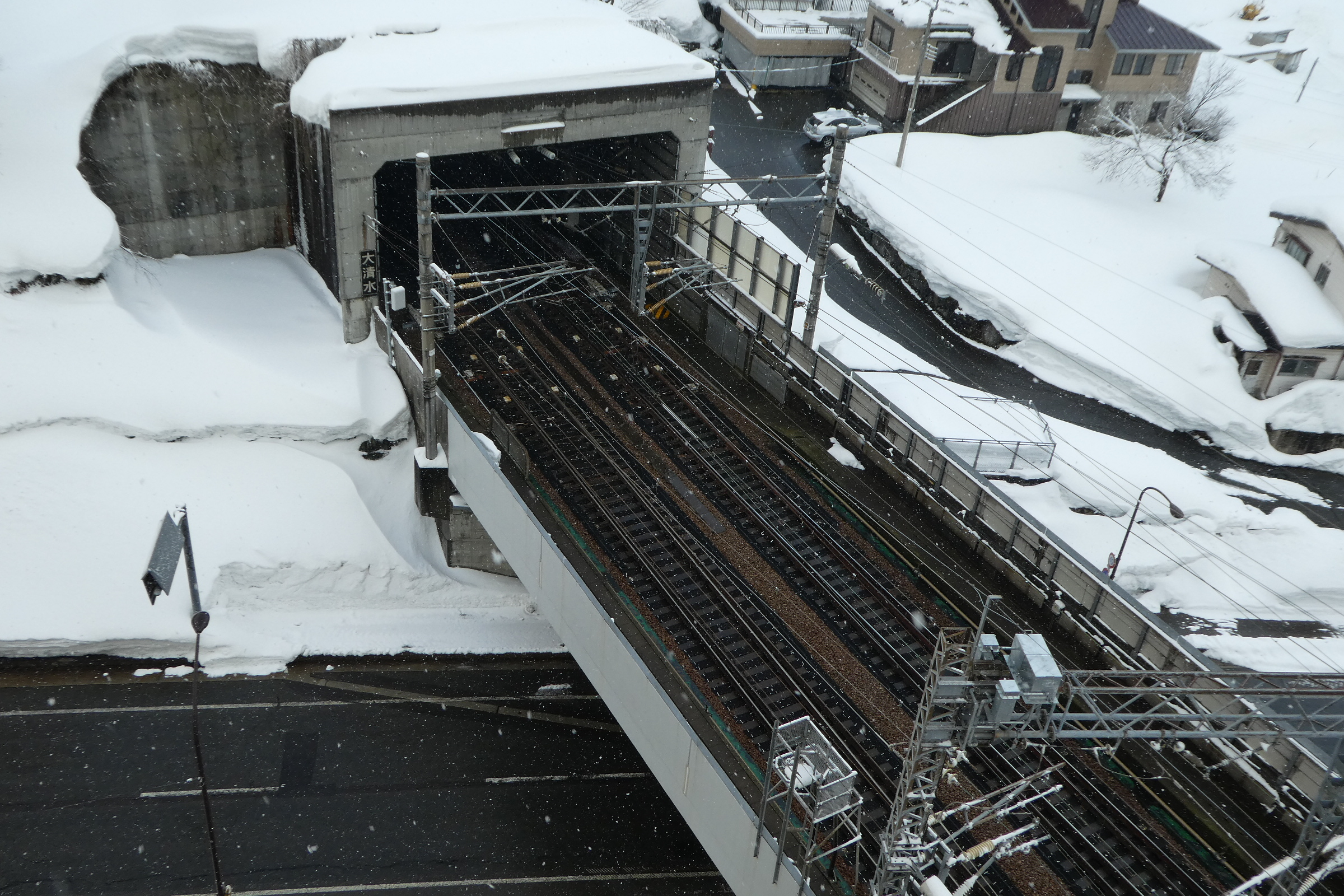 上越新幹線、大清水トンネル。越後湯沢側坑口。